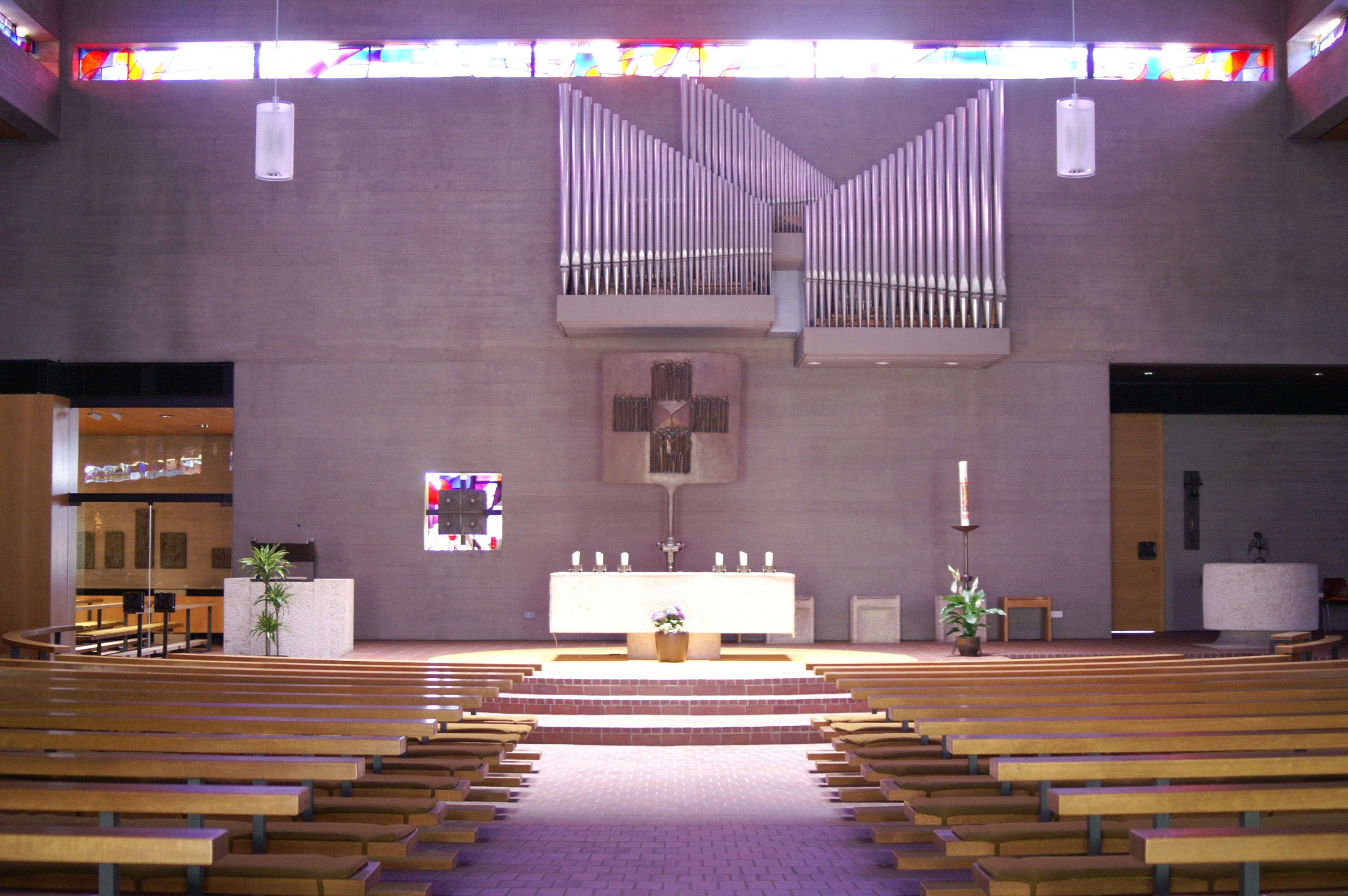 Hl. Geist Regensburg Innenaufnahme